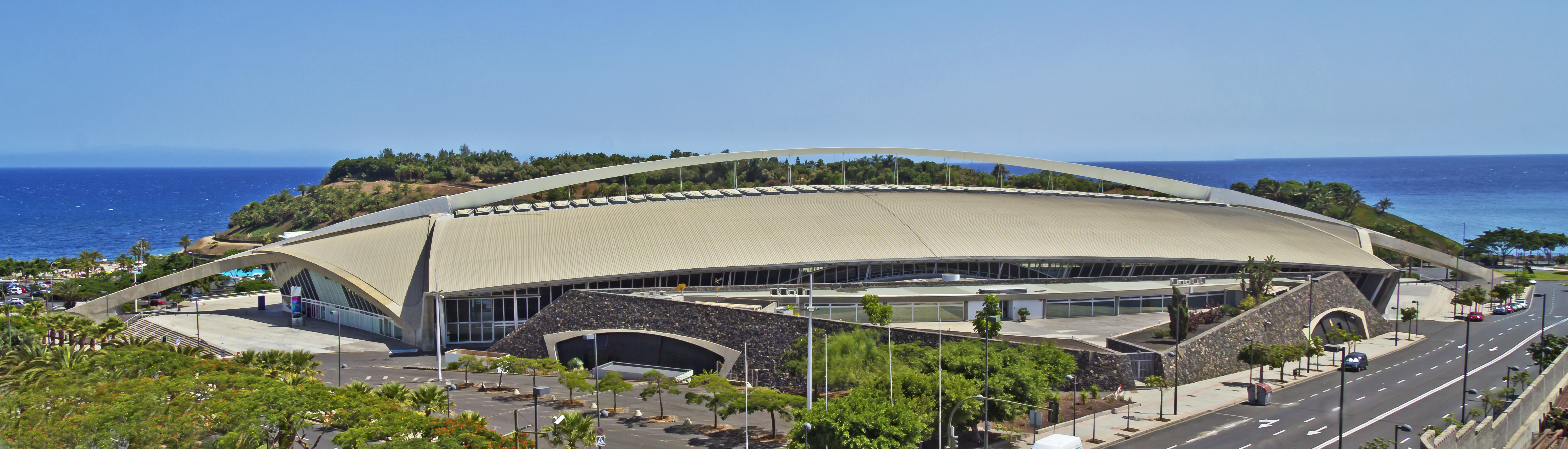 Das Gebäude des „Centro Internacional de Ferias y Congresos de Santa Cruz de Tenerife“ wurde von dem Architekten Santiago Calatrava entworfen. Es wurde 1996 eröffnet.